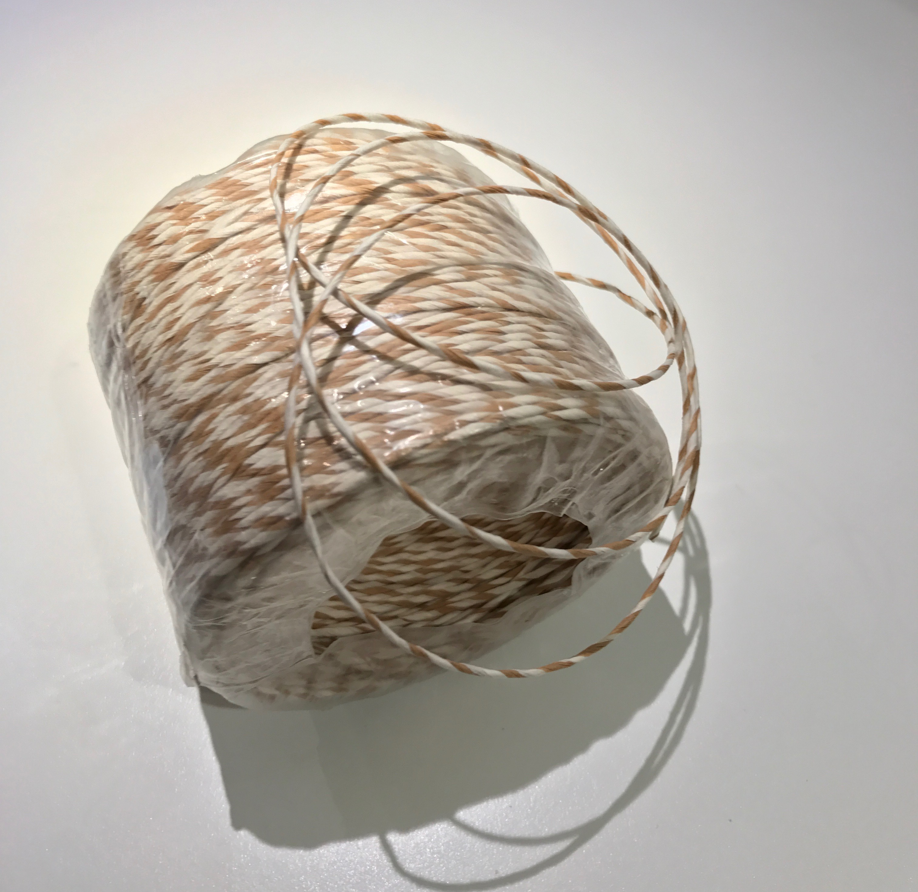 Paperinarukerä